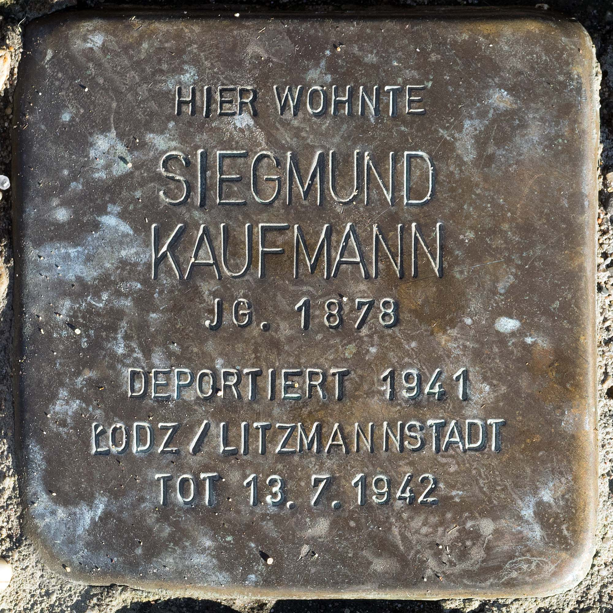 Stolperstein für Kaufmann Siegmund